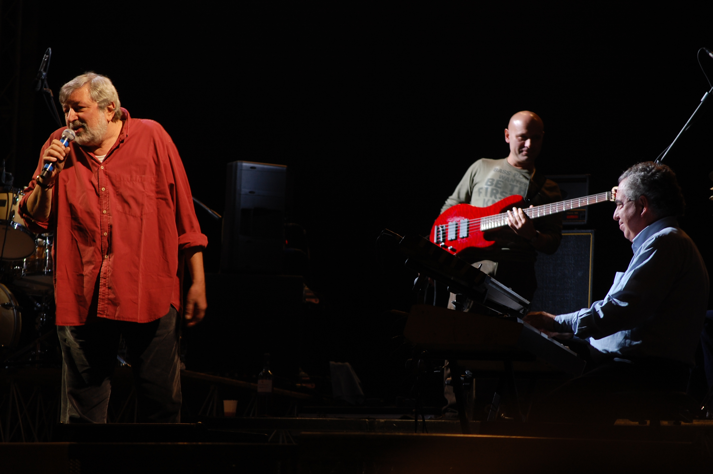 Vince Tempera scherza con Francesco Guccini durante un'esibizione live